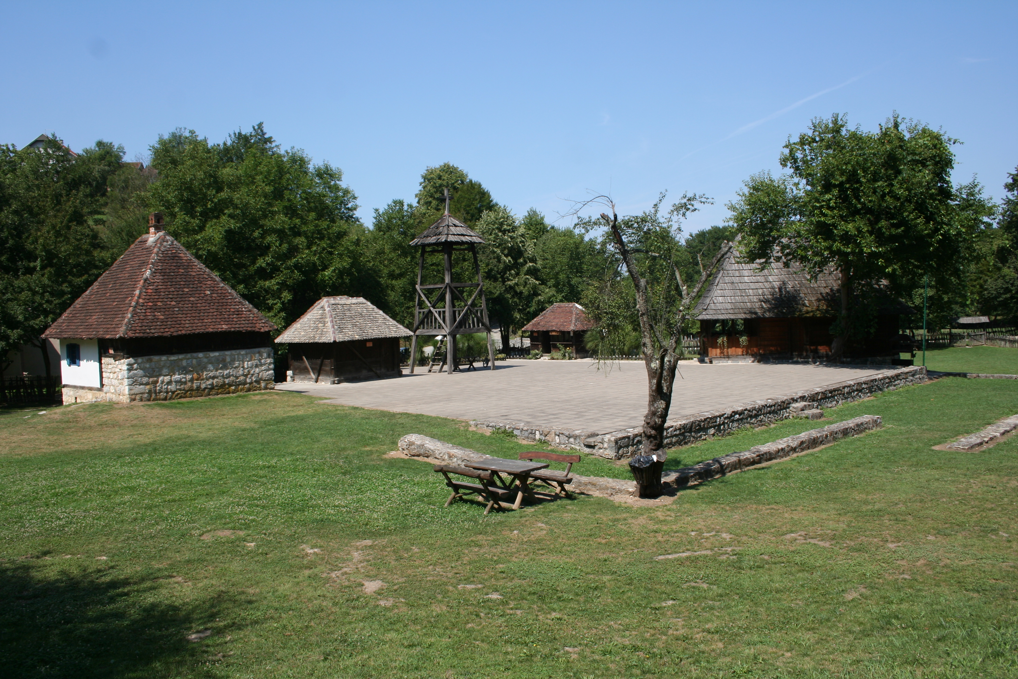 Saborište u Tršiću